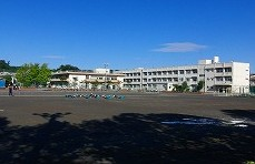 横浜市立金沢中学校の1棟校舎